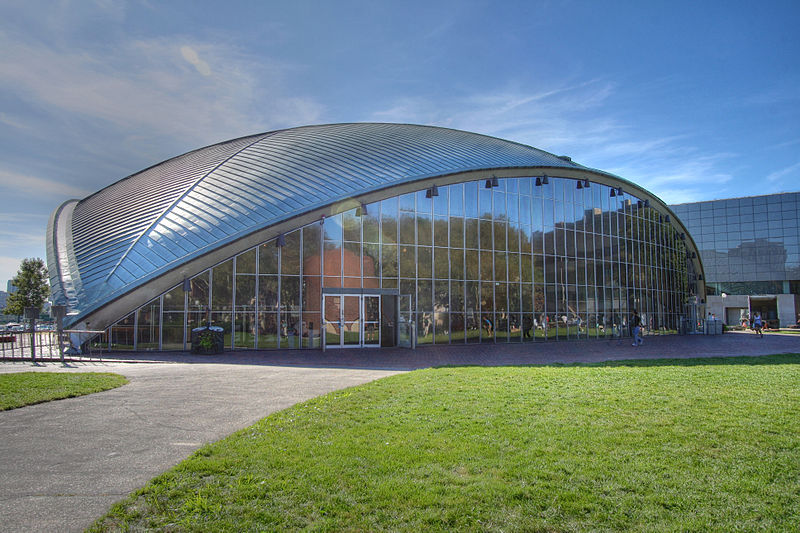 Кресжская аудитория МИТа